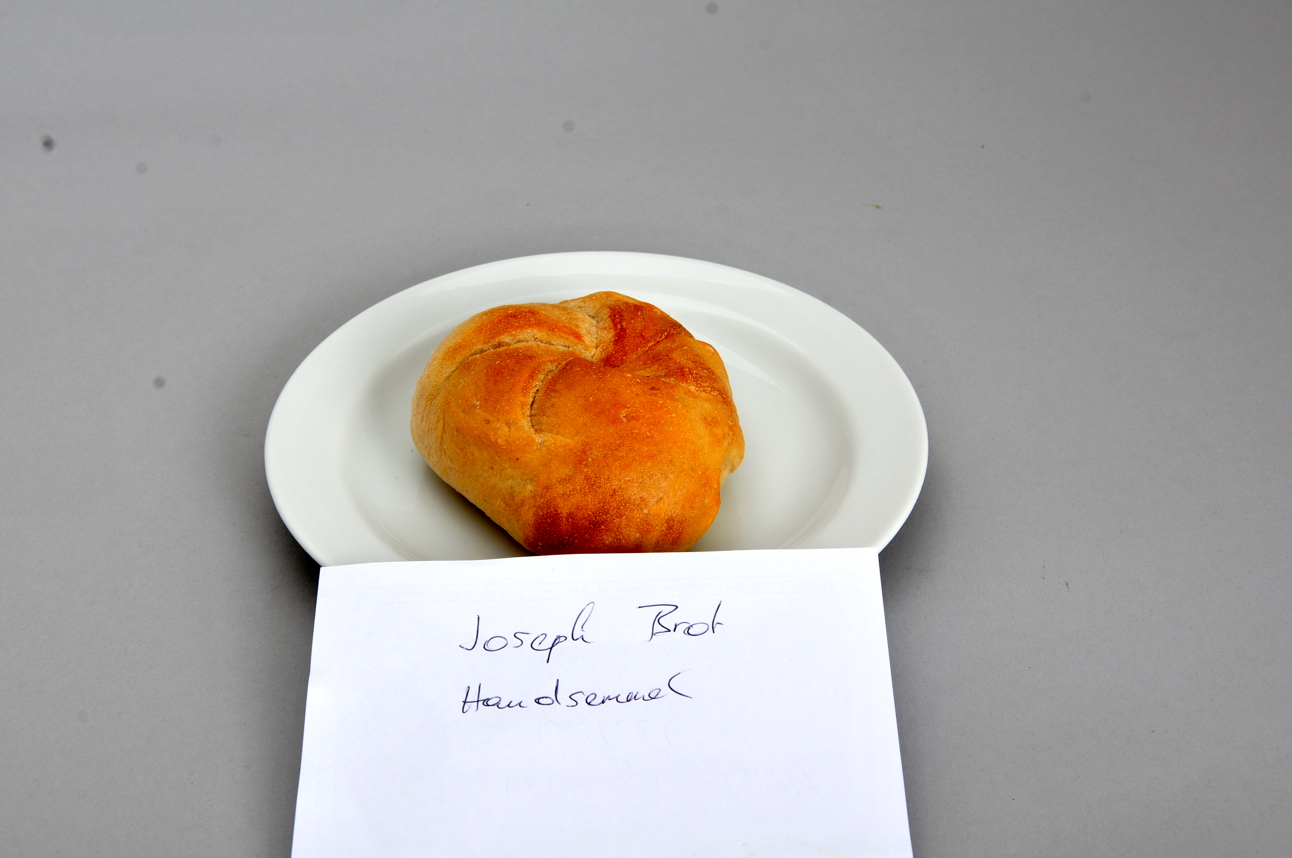 Treffen der Redaktion Essen und Trinken ion Wien